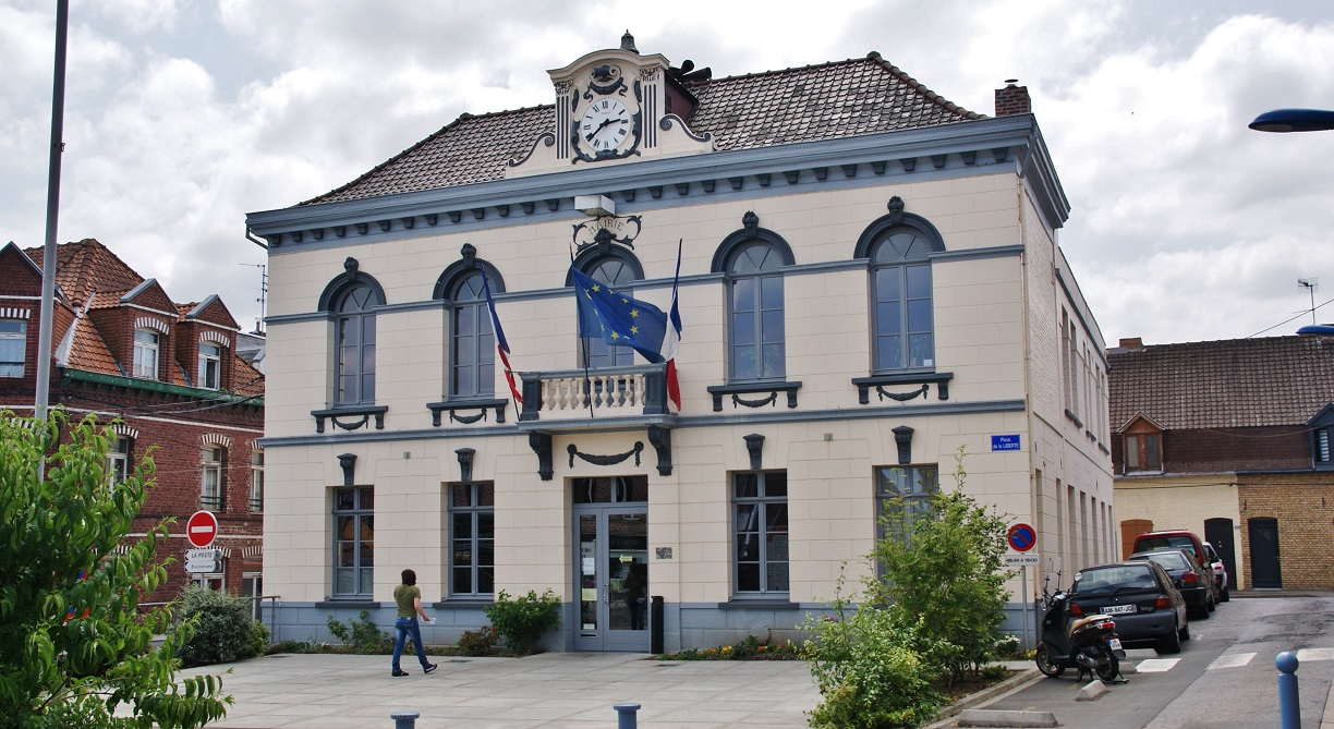 Hotel-de-Ville